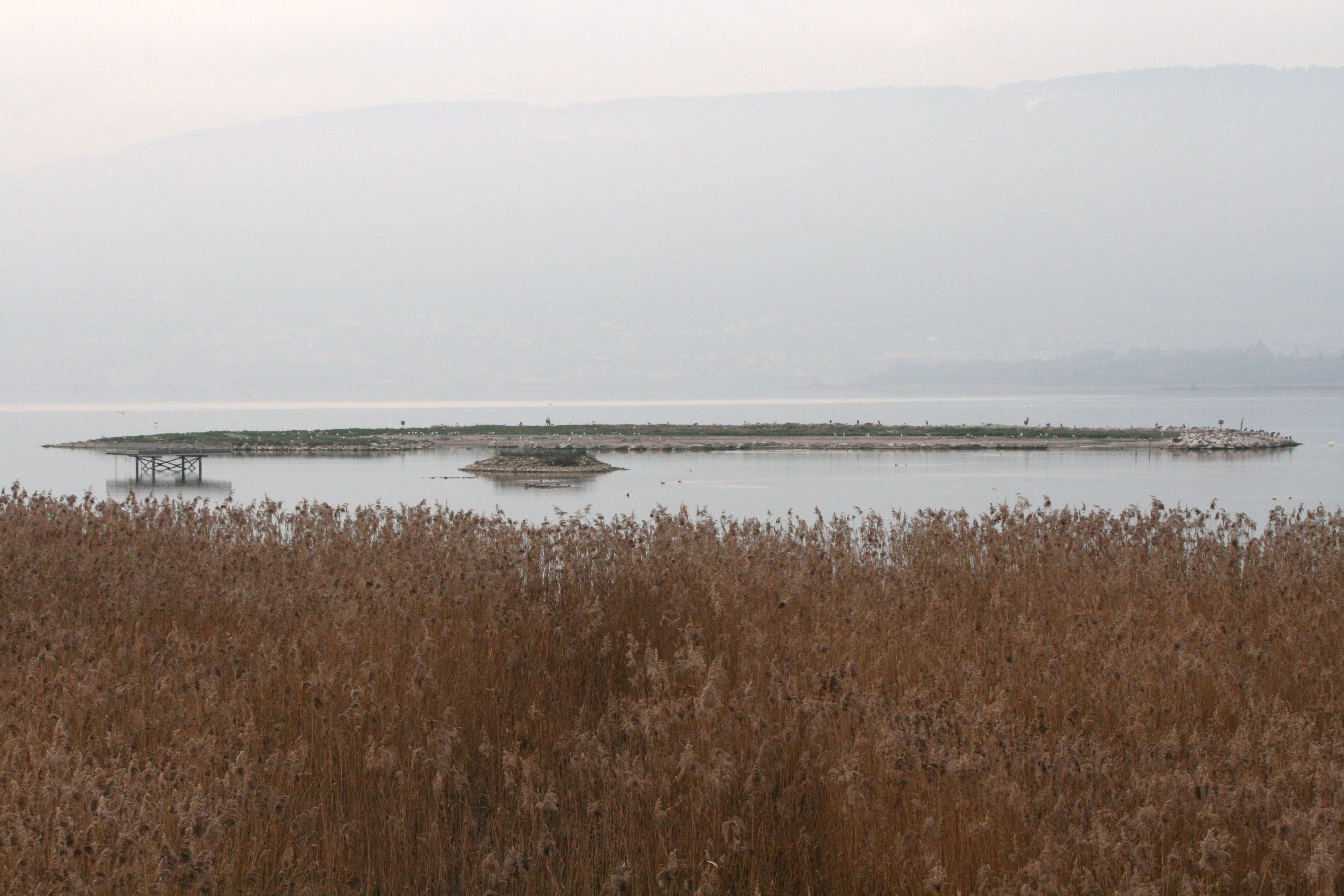 Vogelinseln im Naturschutzgebiet Fanel, Schweiz